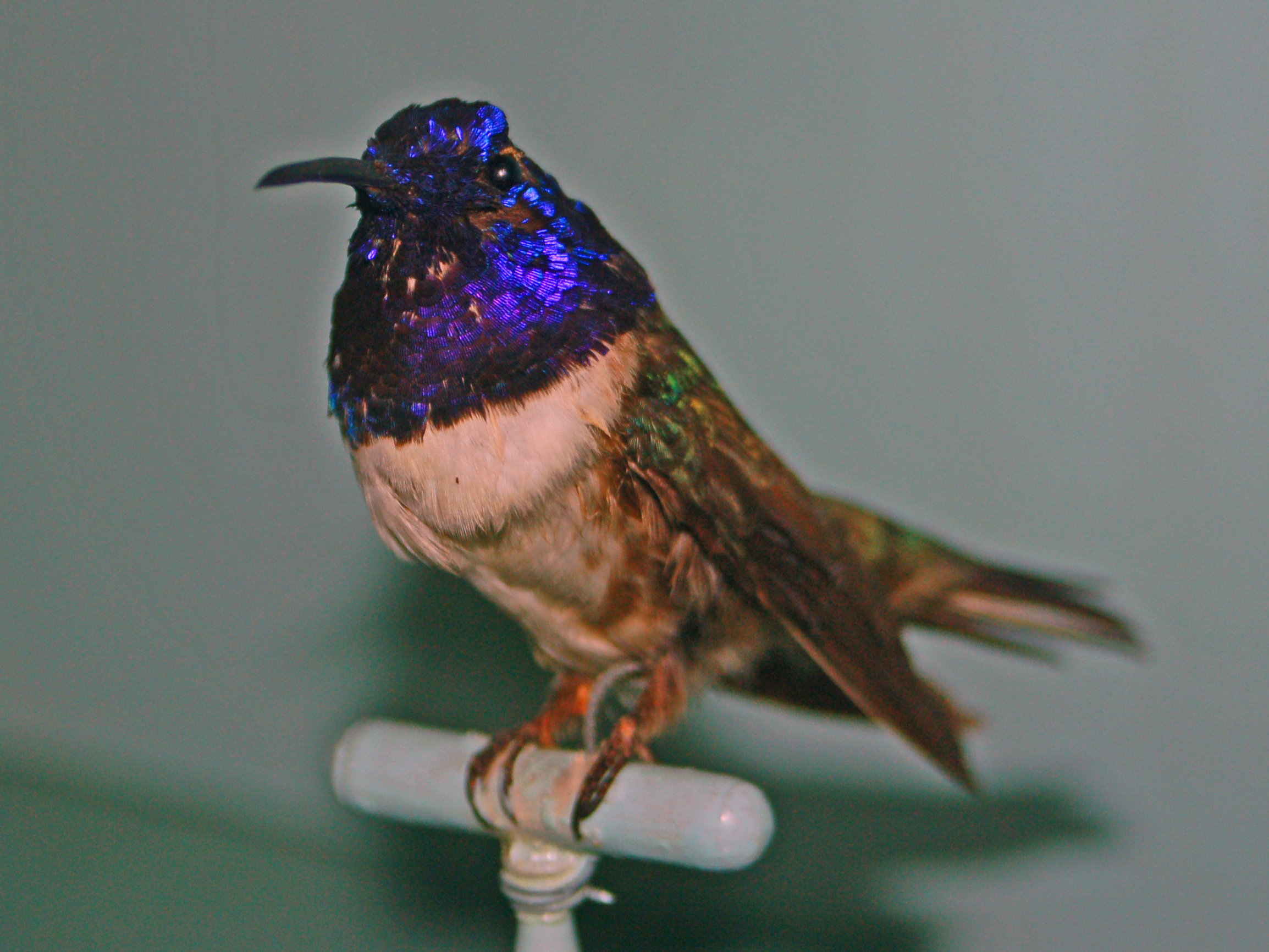 Trochilidae - Oreotrochilus chimborazo